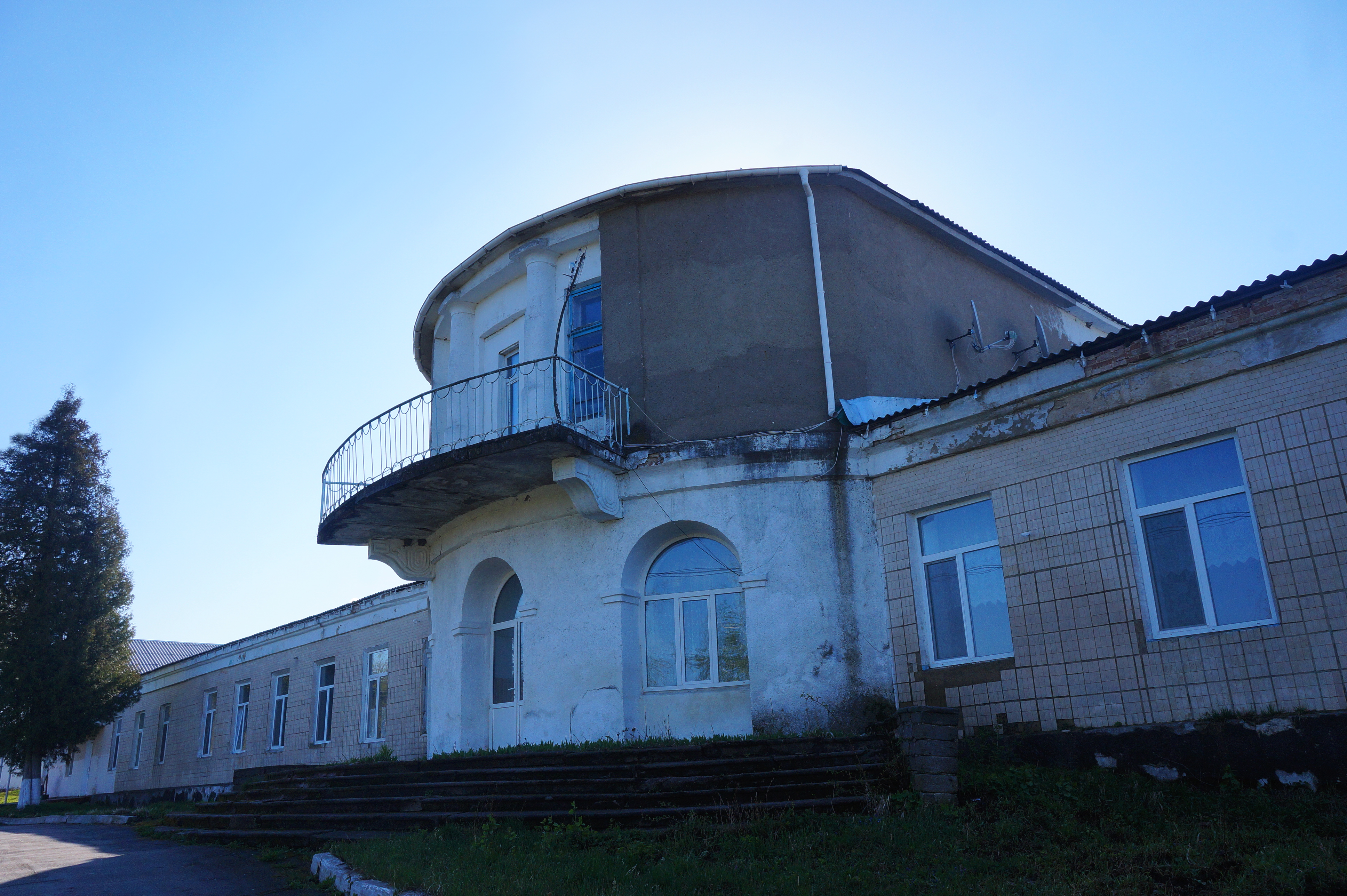 Палацо-парковий ансамбль садиби Орловських - Палац, Северинівка